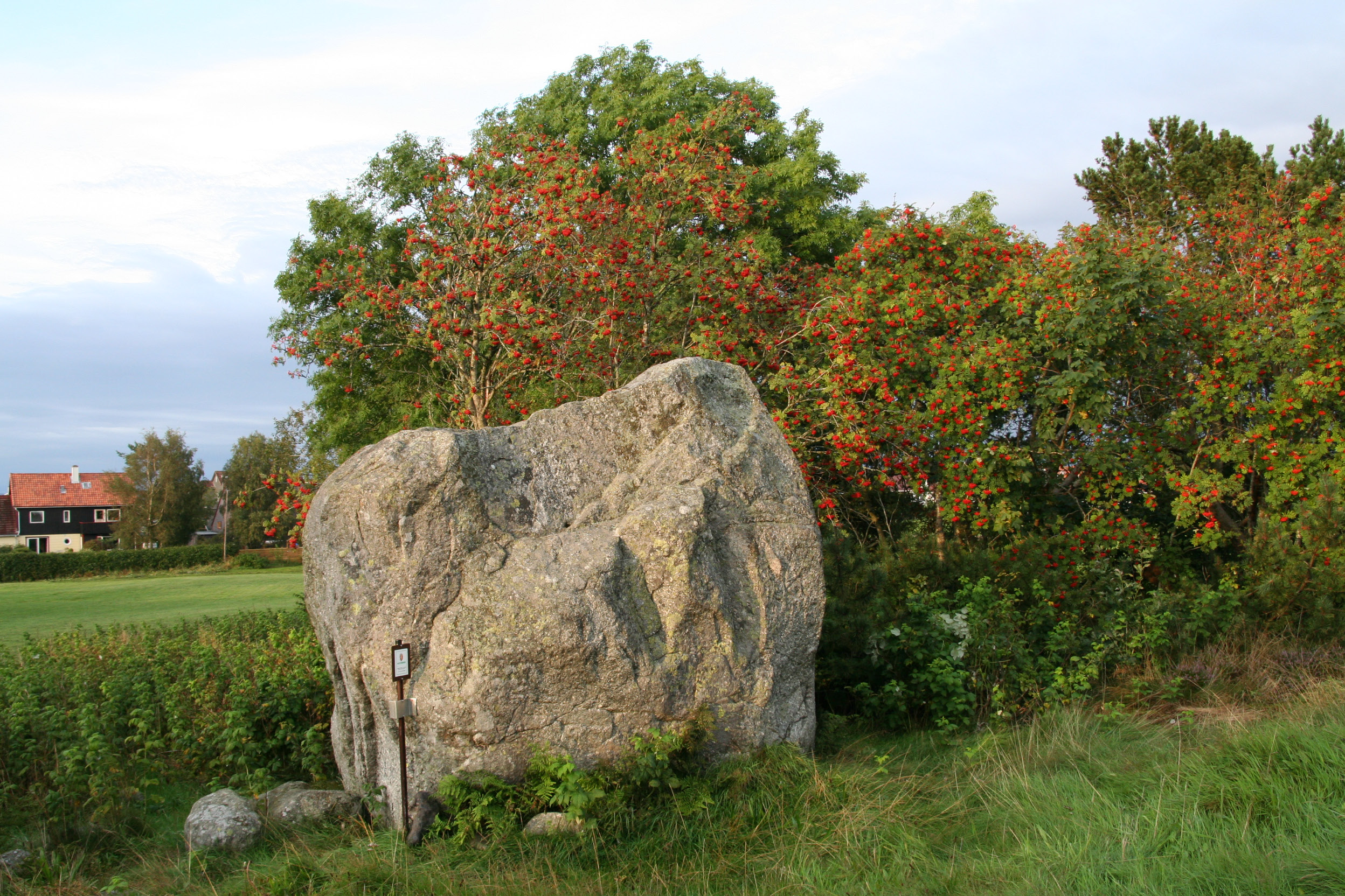 Vernet flyttblokk på Byhaugen i Stavanger